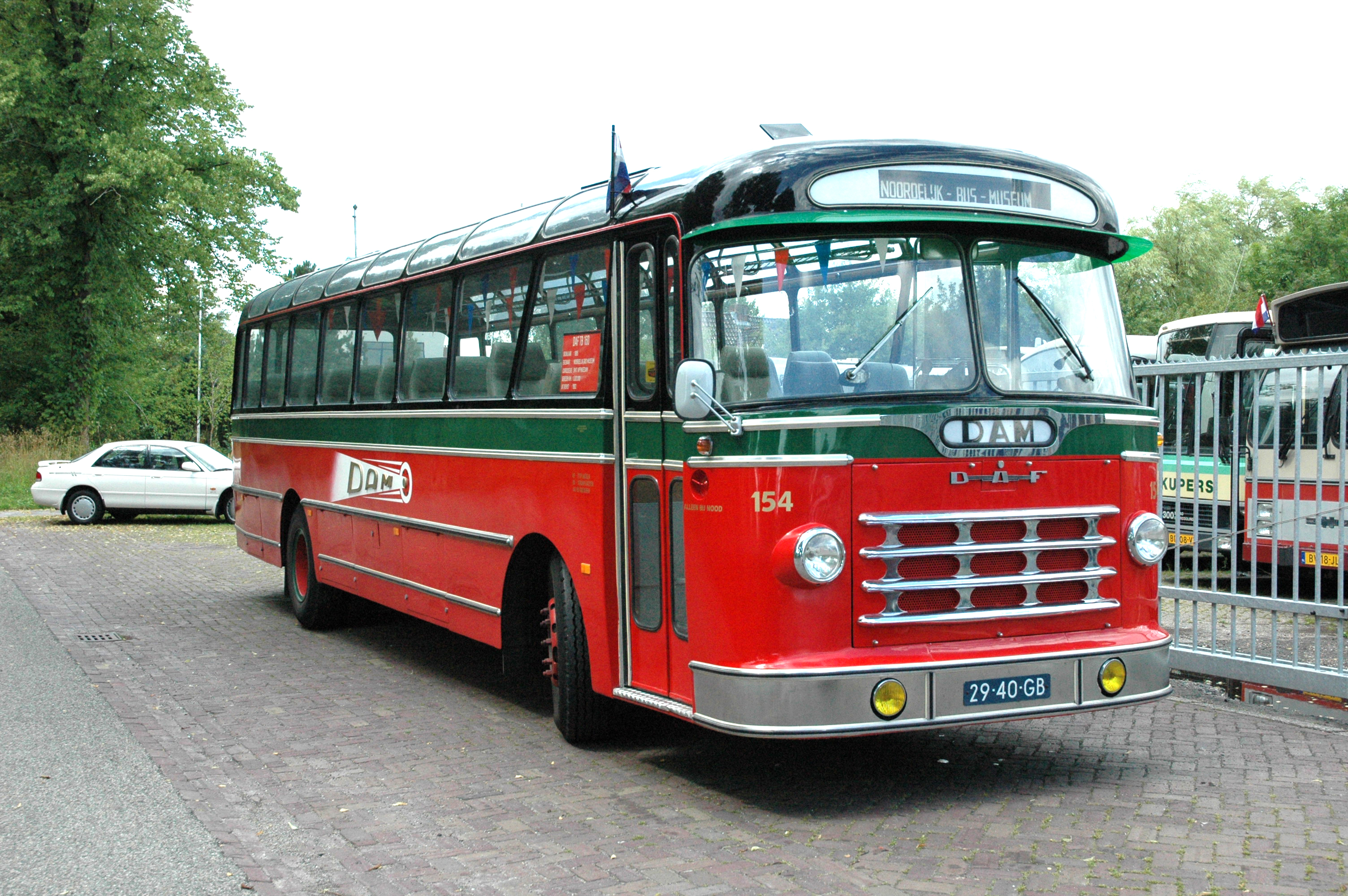 Damster Auto-Maatschappij bus 154 Smit Appingedam / DAF TB160DD530 te Winschoten. (foto: DSC 2297)